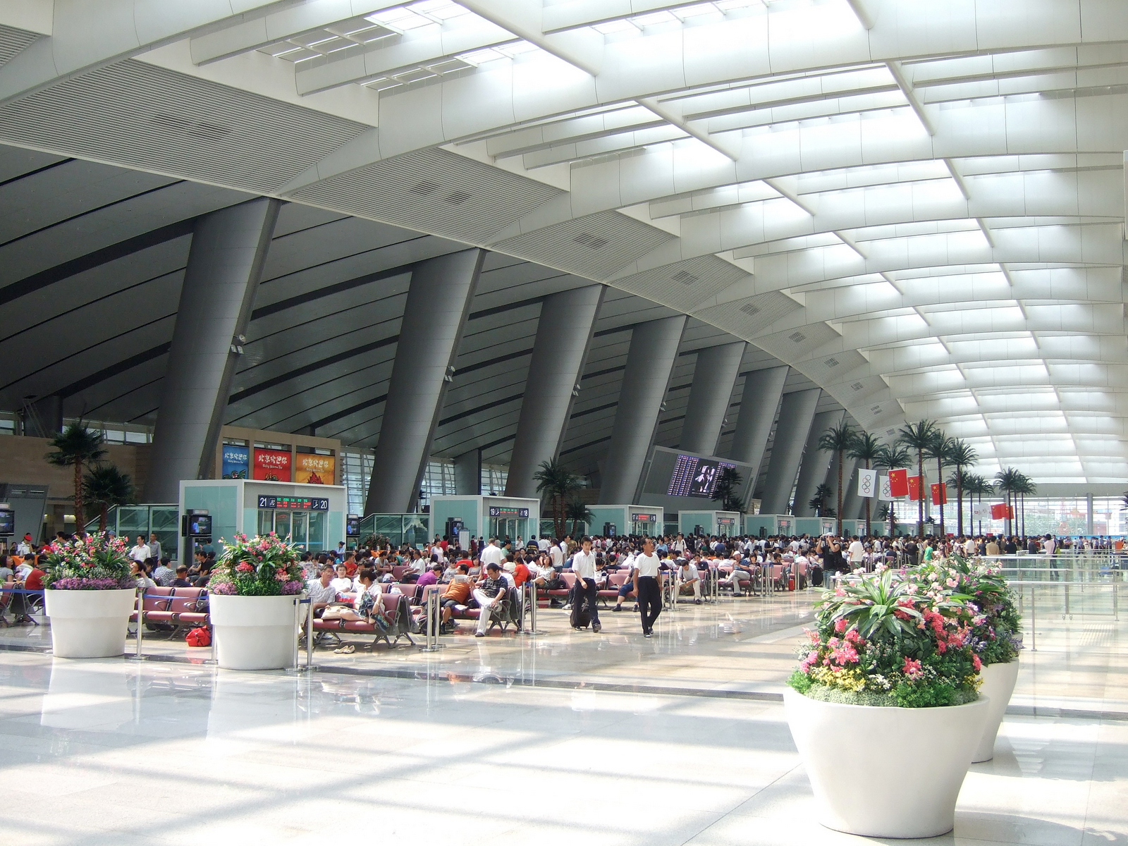 中文（中国大陆）: 北京南站候车厅